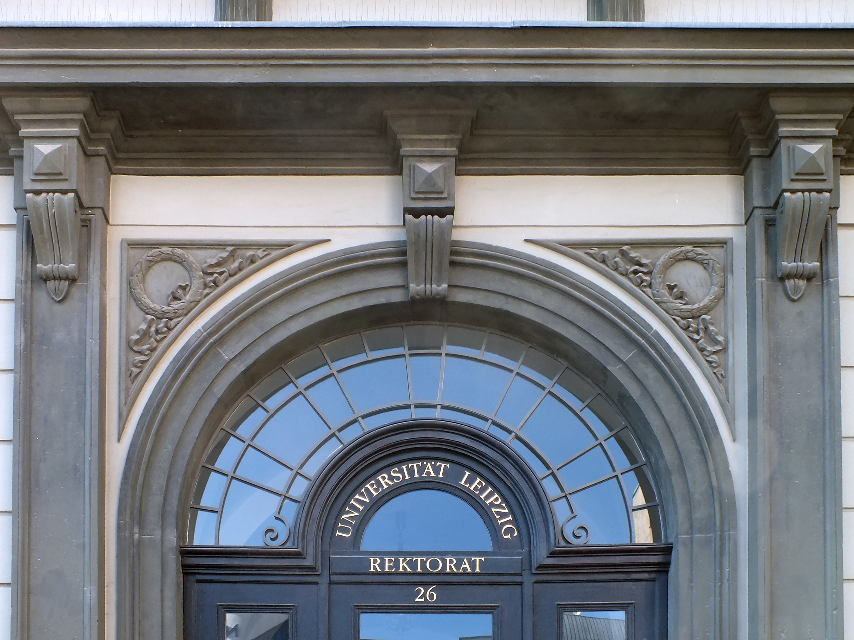 Portal des Rektorats der Universität Leipzig im ehemaligen Königlichen Palais Ritterstraße 26